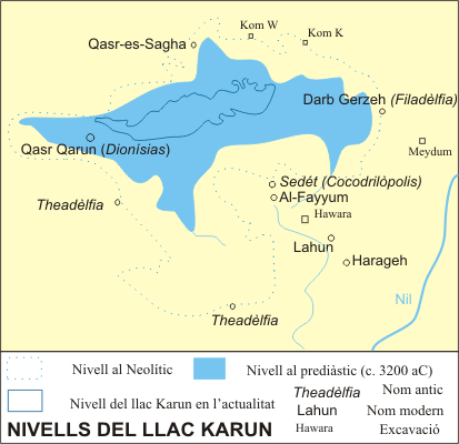 Nivells del llac Karun o Qarun